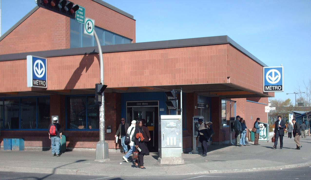 Cote Vertu Montreal metro station.